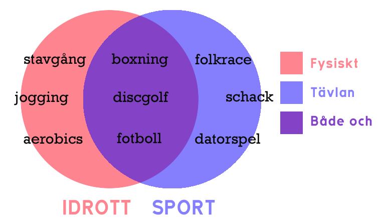 Beskriver skillnaden mellan sport och idrott.